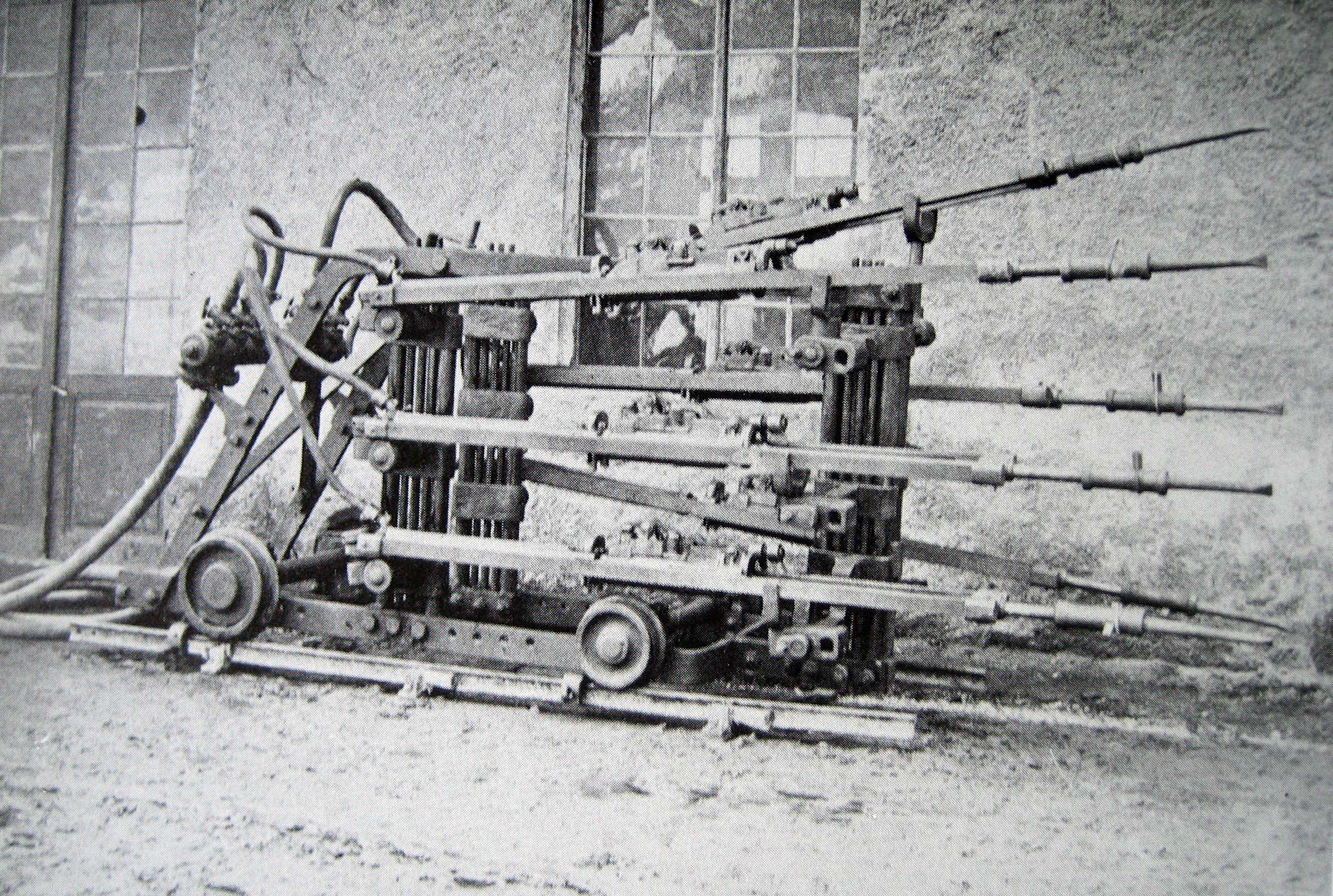 Druckluft-Bohrmaschine System Ferroux simplifié, aufgenommen in Göschenen vor der Werkstatt nach 1875